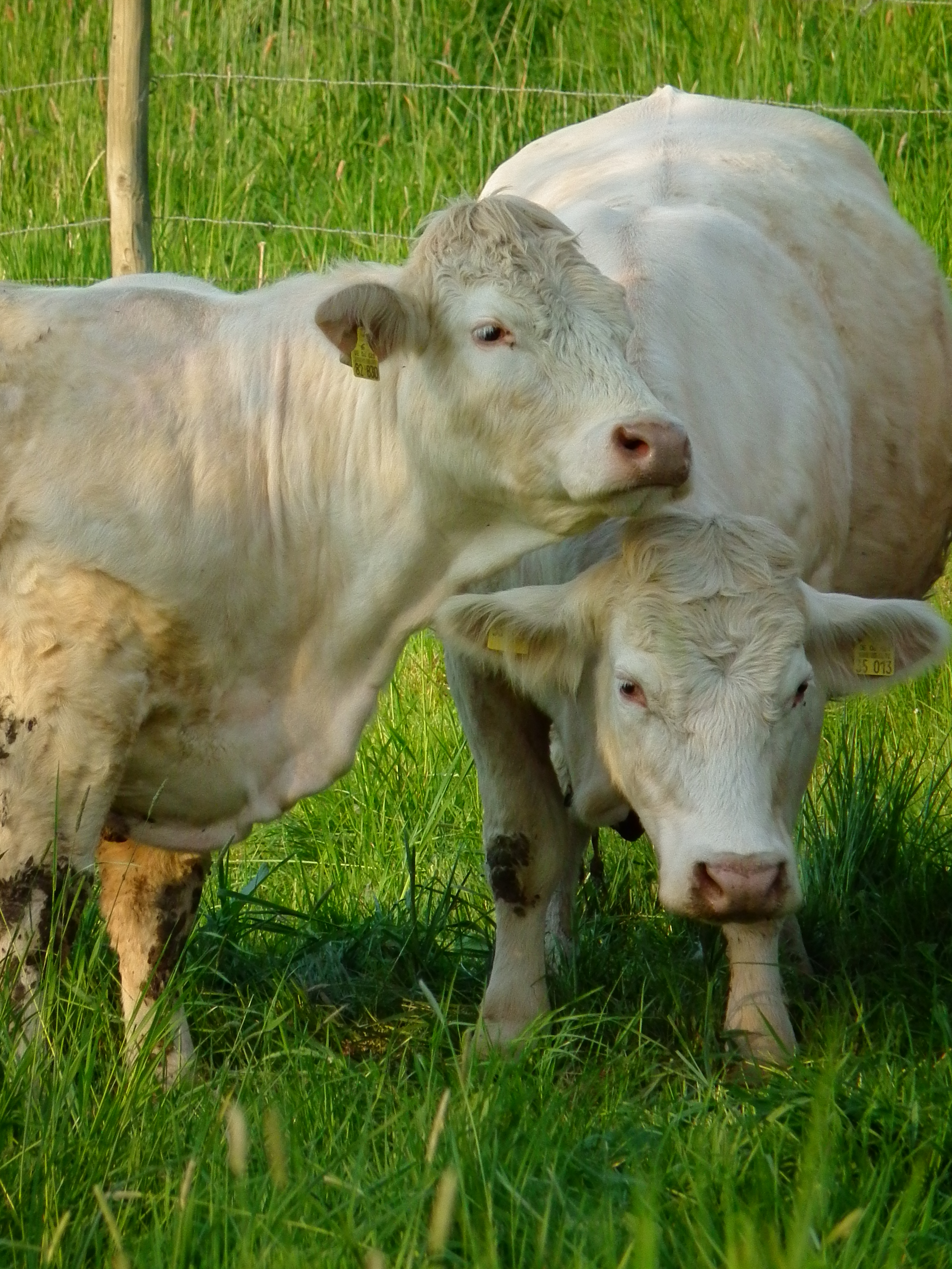 Charolais auf einer Weide in der Nähe von Linnenbach im Kreis Bergstraße (Hessen, Deutschland)